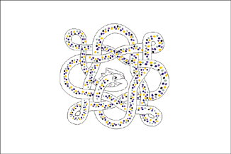 Bandera del principe de Manipur Imagen realizada por J. Ollé Véase también: Wikipedia:Autorizaciones/Banderas de Jaume Ollé Categoría:Banderas (imagen)